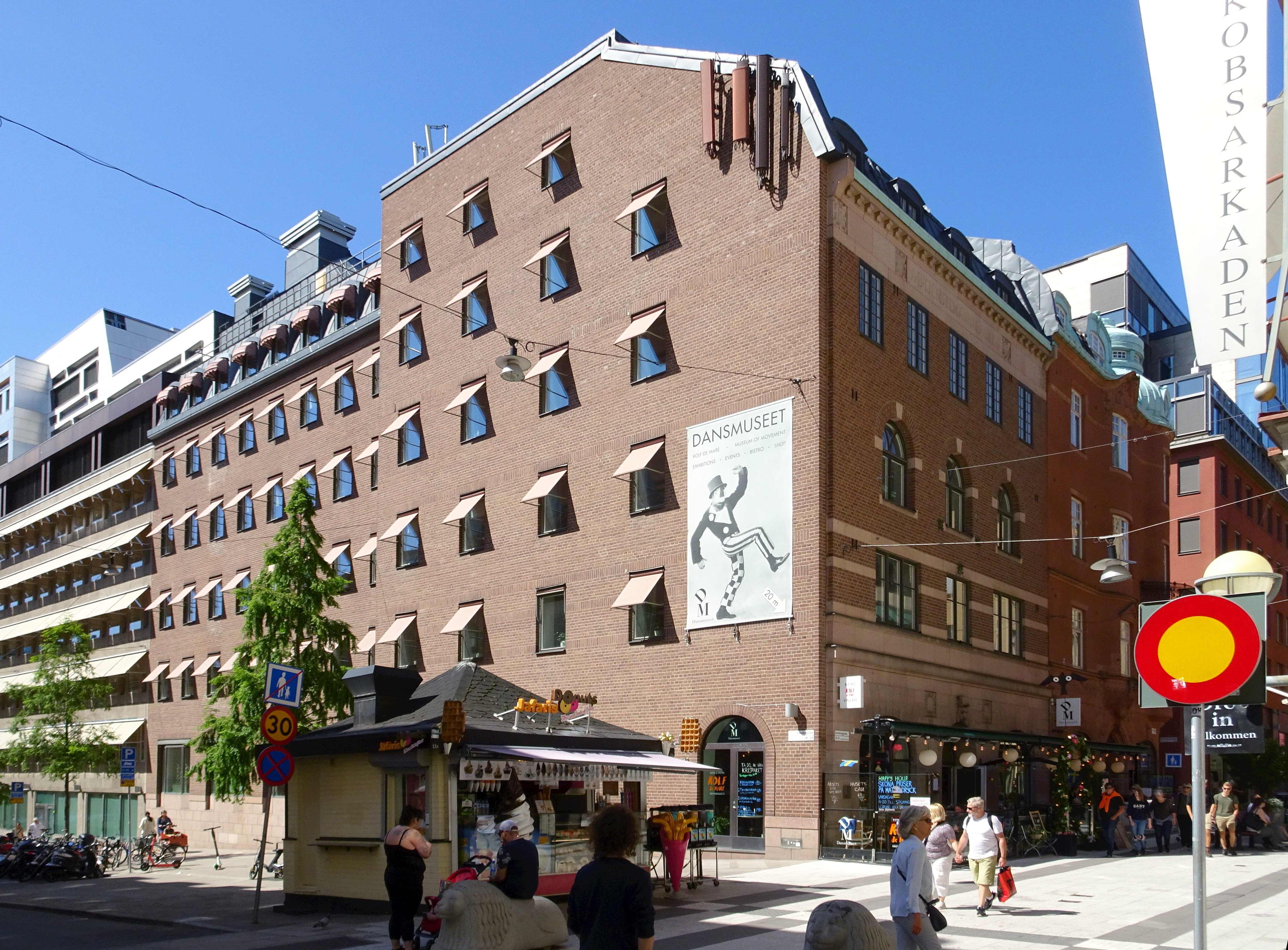 Jakobsgatan 20, Drottninggatan 13